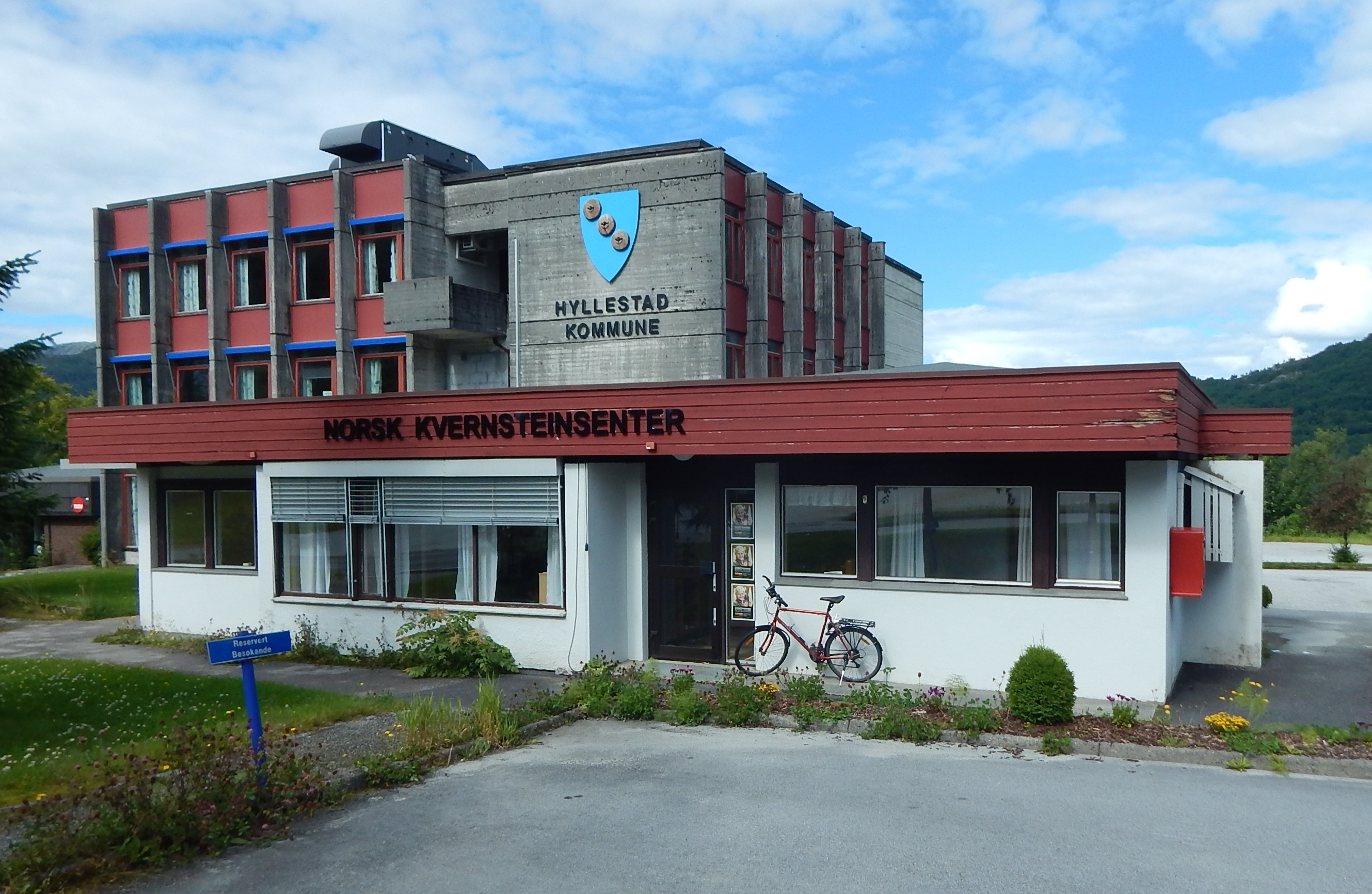 Hyllestad kommunehus og Norsk kvernsteinsenter